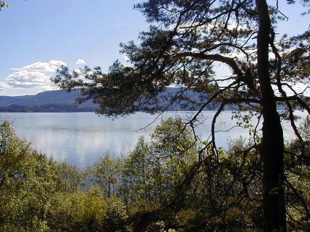 «Idyll ved Tyrifjorden» (T. Bjornstad)